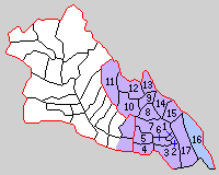 三重県桑名郡の町村制時点の町村。